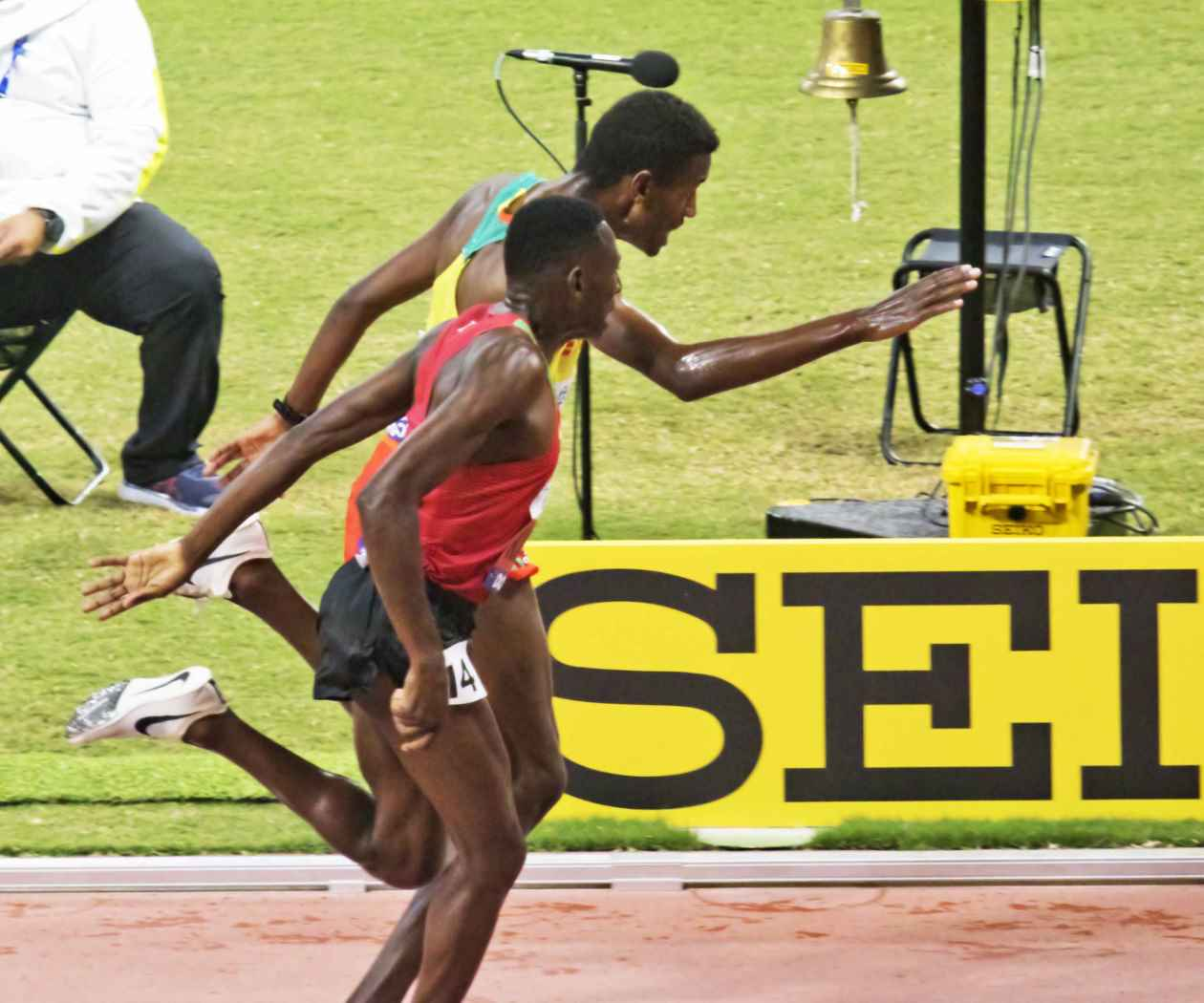 DOH80129 3000mSt men final